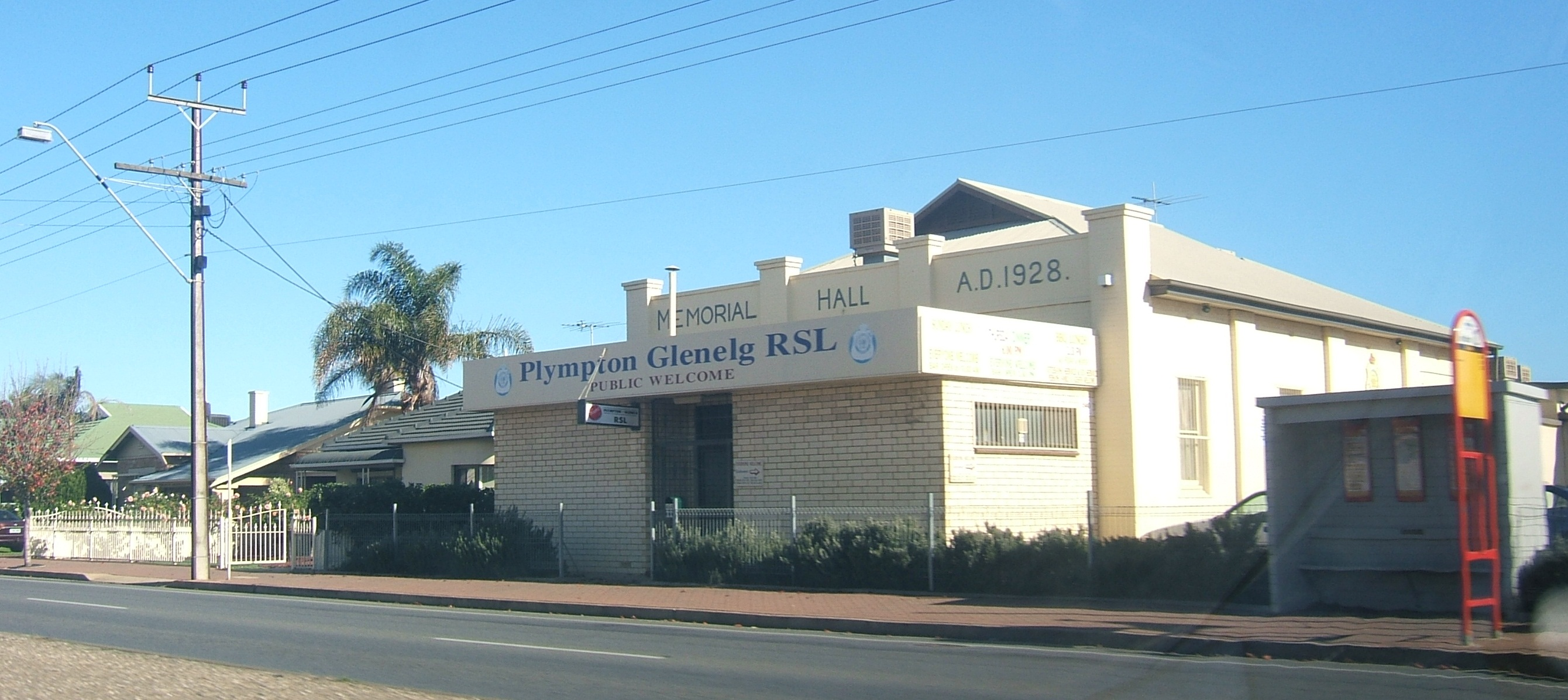 PLympton Park, Adelaide